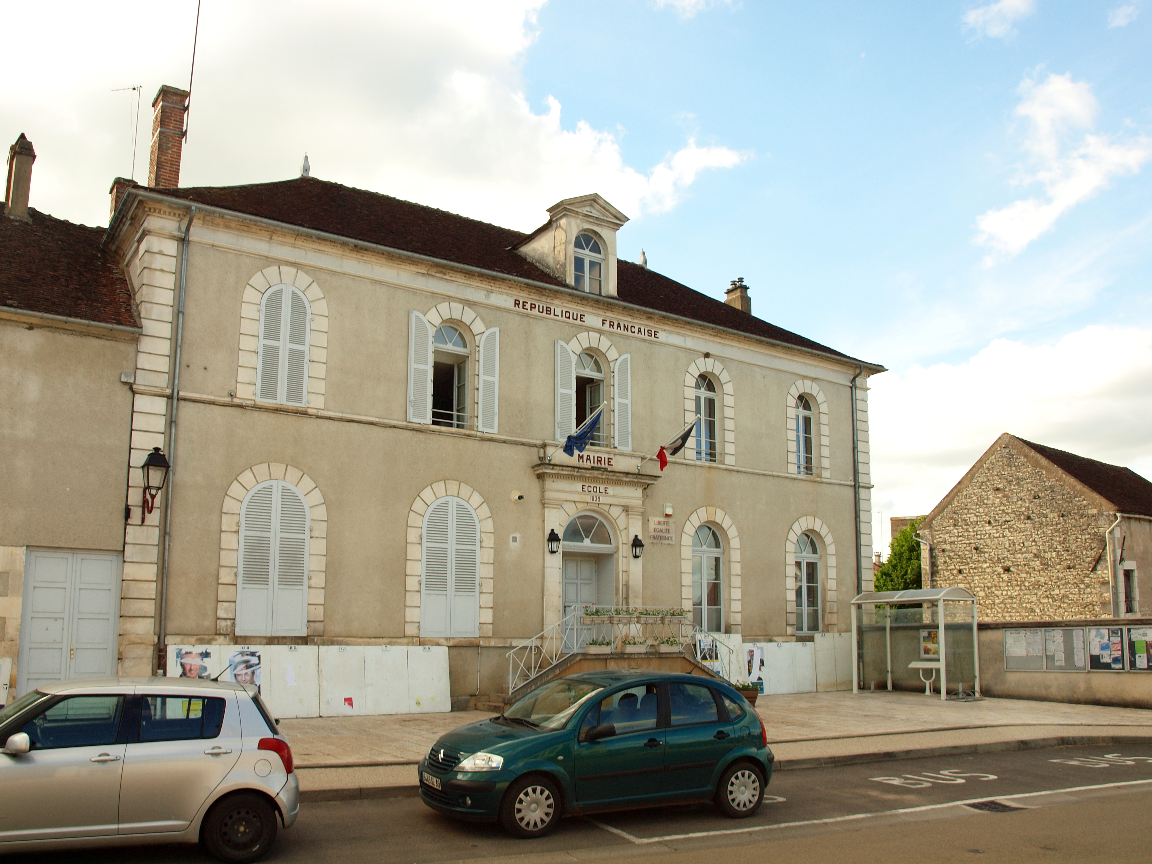 Bazarnes (Yonne, France)